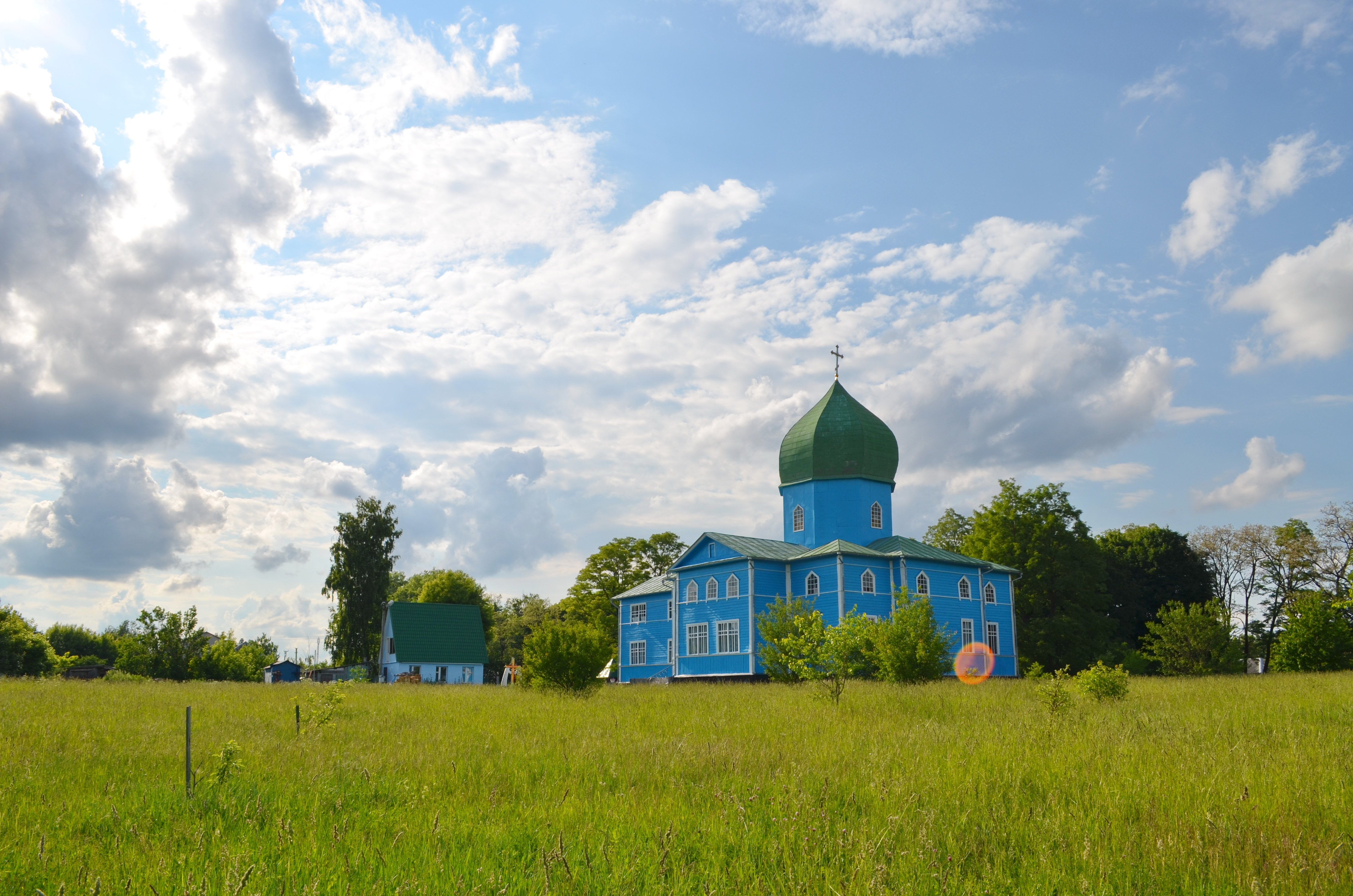 Церква Різдва Богородиці (дер.), село Перемога